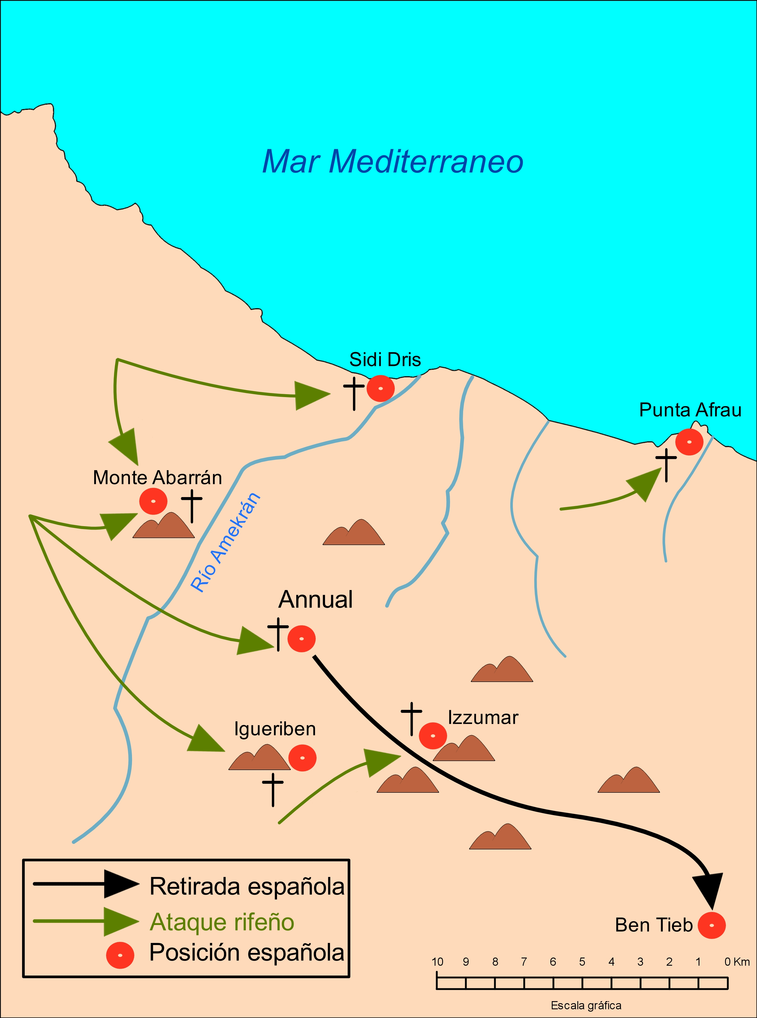 Croquis en el que se representan las principales acciones bélicas alrededor de Annual en 1921 que provocaron la retirada conocida como Desastre de Annual en la guerra del Rif.